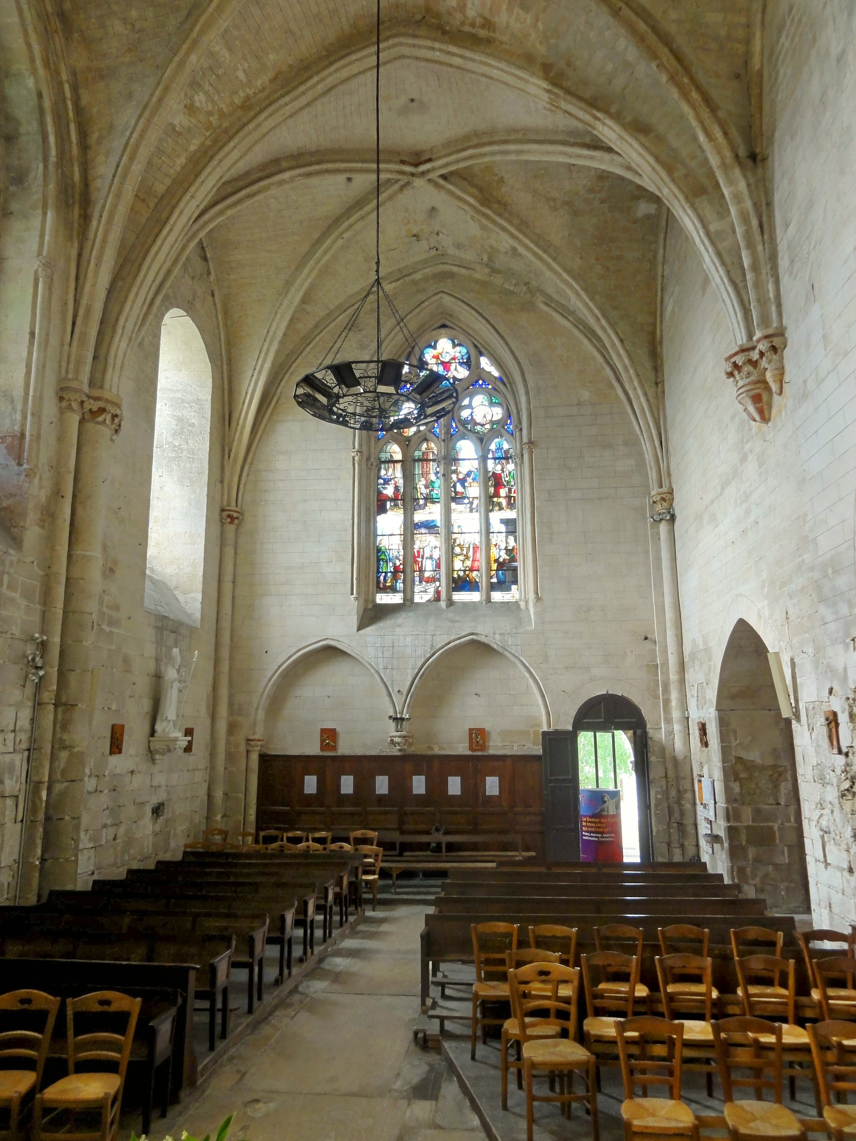 Vue intérieure depuis le nord.